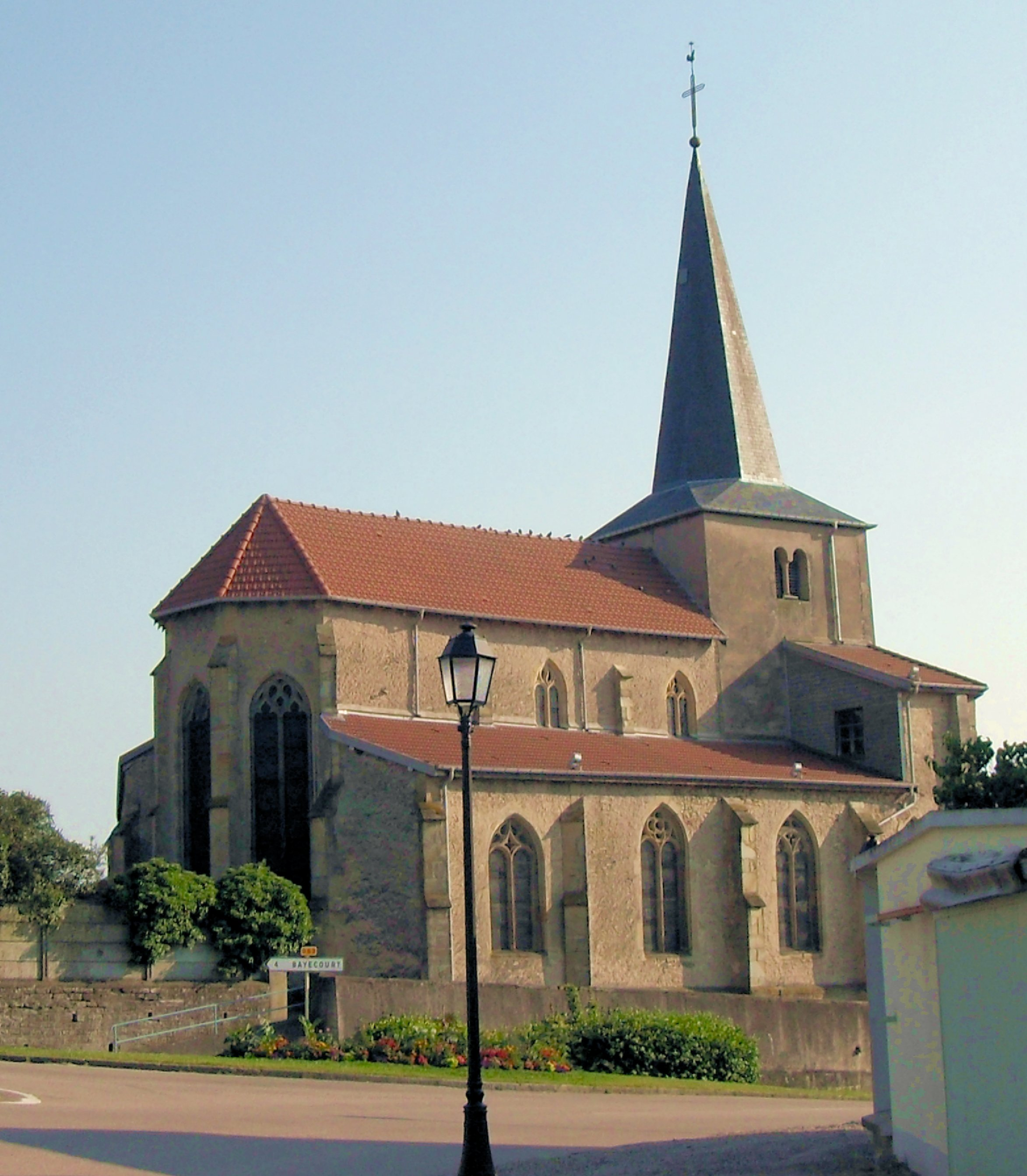 L'église de la Nativité-de-Notre-Dame de Girmont